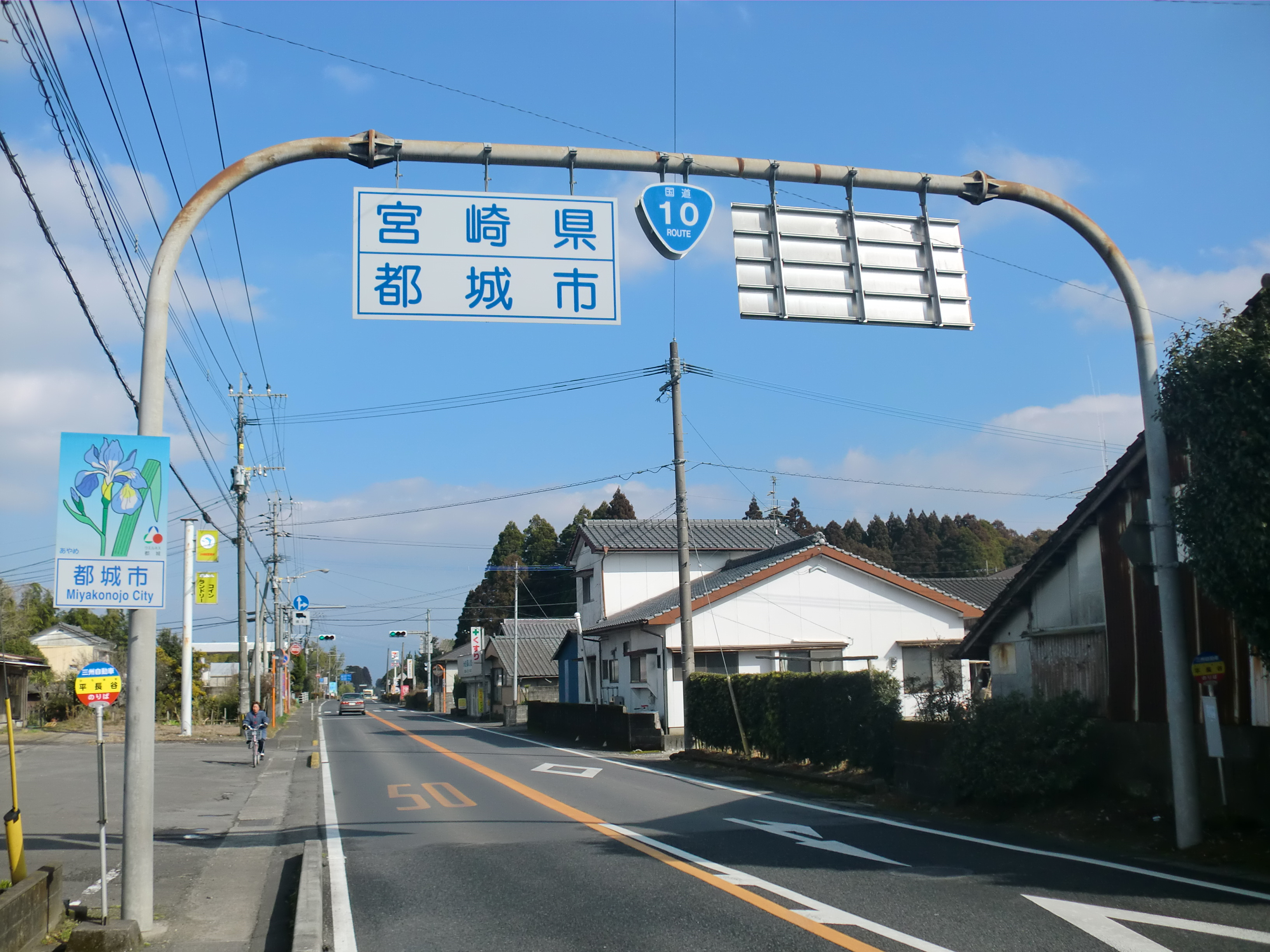 国道10号線にある鹿児島県曽於市と宮崎県都城市の境界。